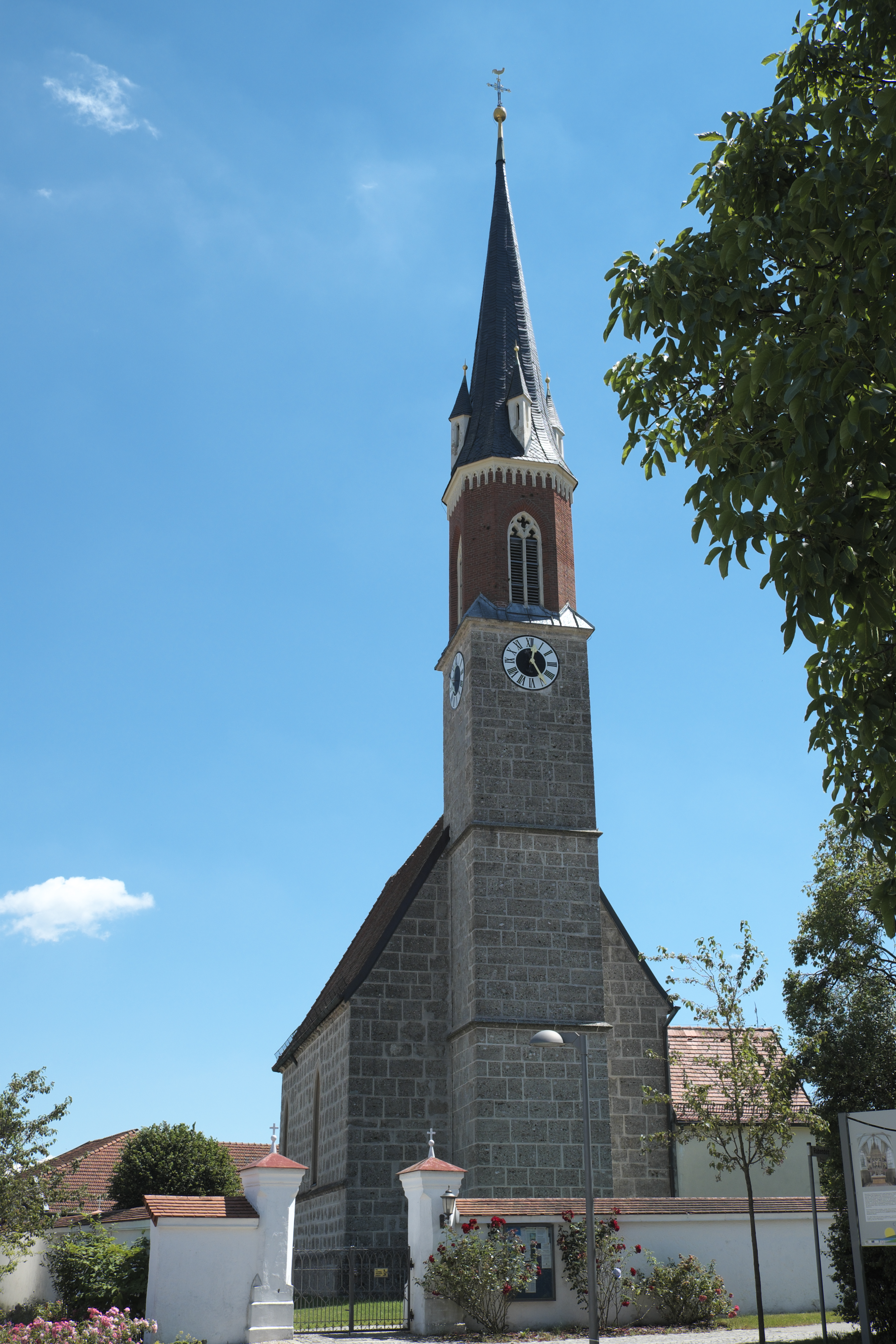 Katholische Filialkirche St. Jakobus der Ältere in Rabenden, einem Ortsteil von Altenmarkt an der Alz im Landkreis Traunstein (Bayern/Deutschland)